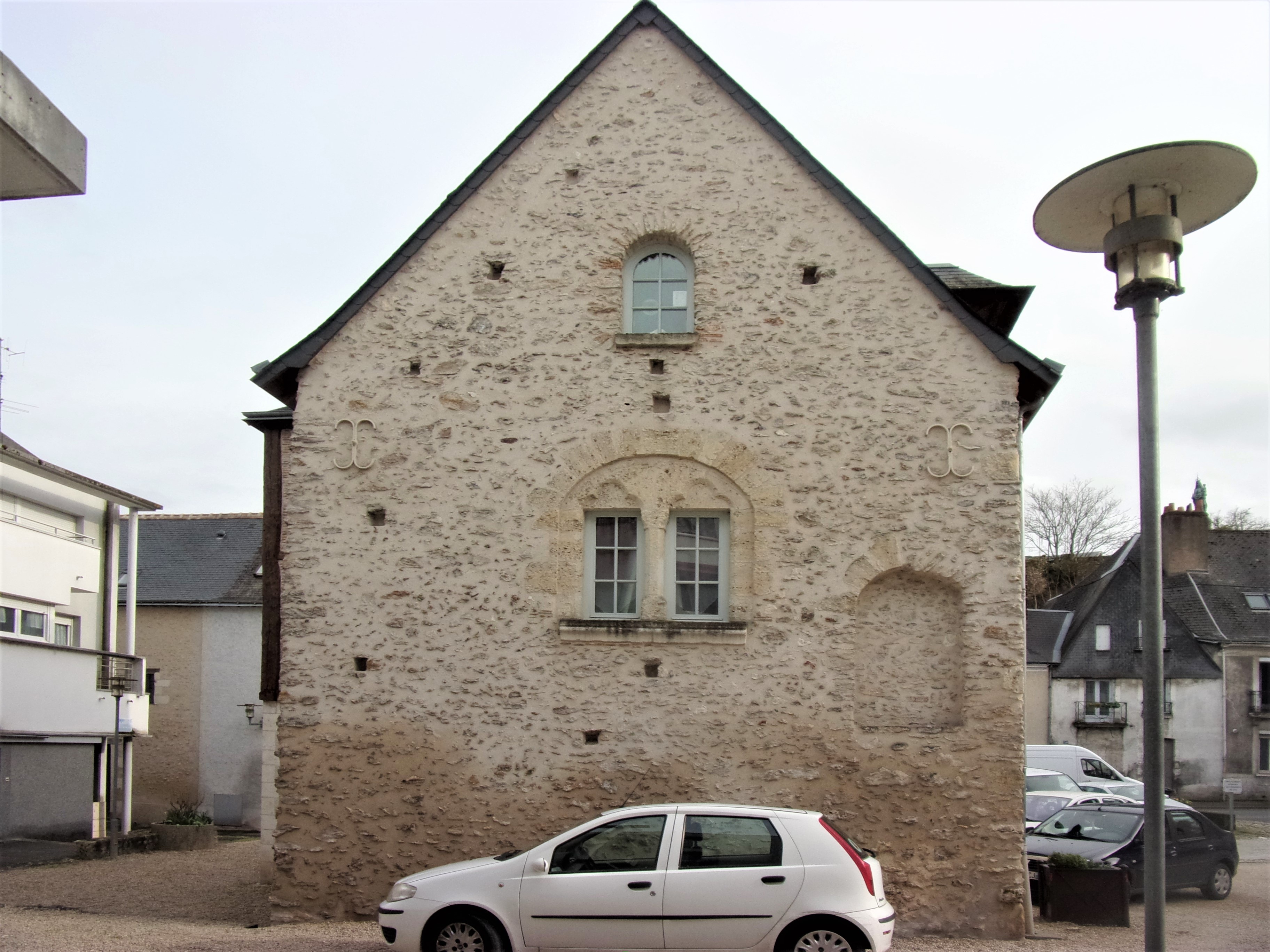 Maison Putsinus - façade ouest